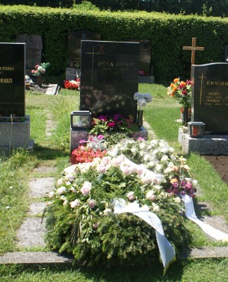 Grab Rosemarie Isopp-Inzersdorfer Friedhof